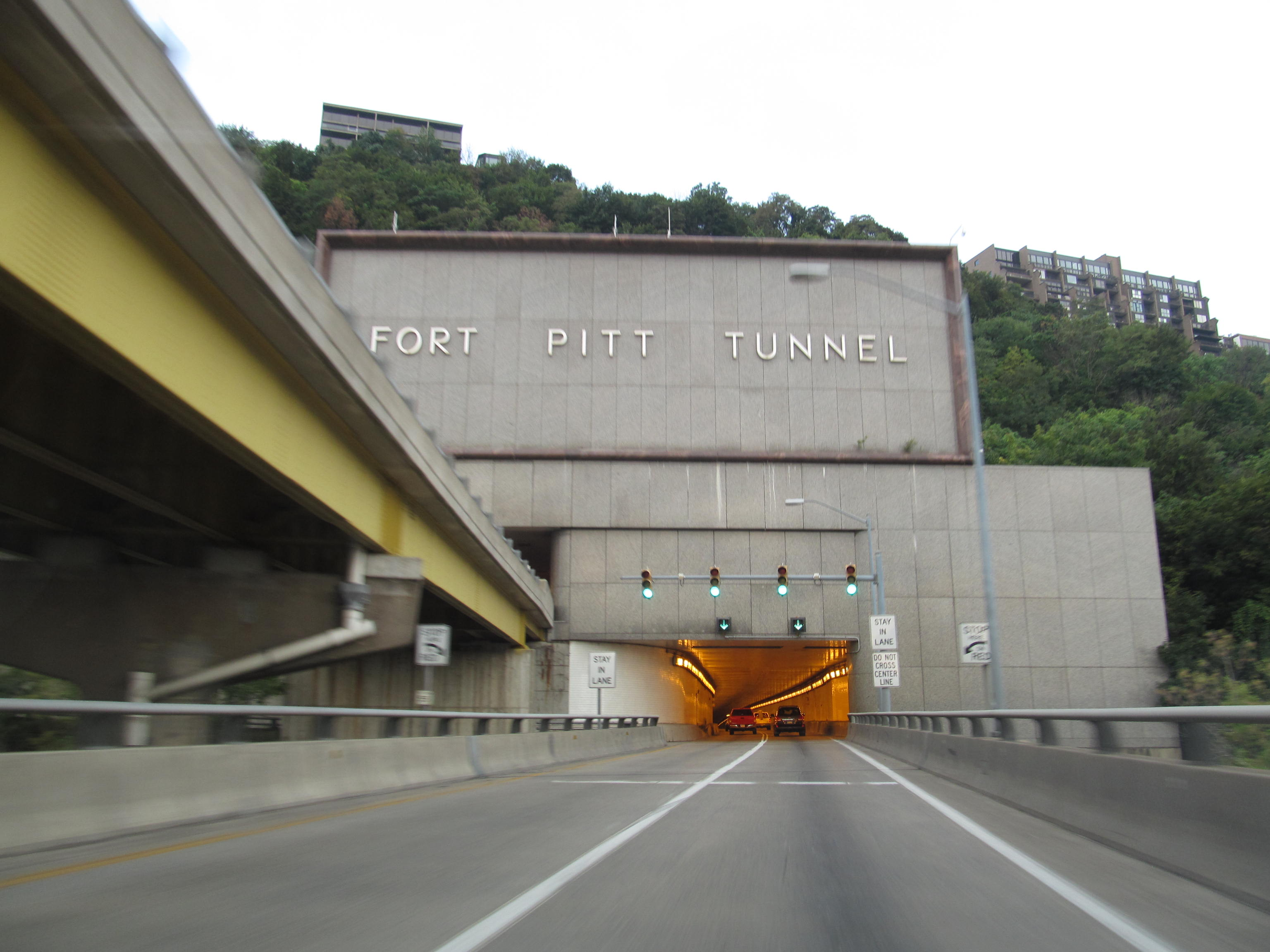 Interstate 376 - Pennsylvania